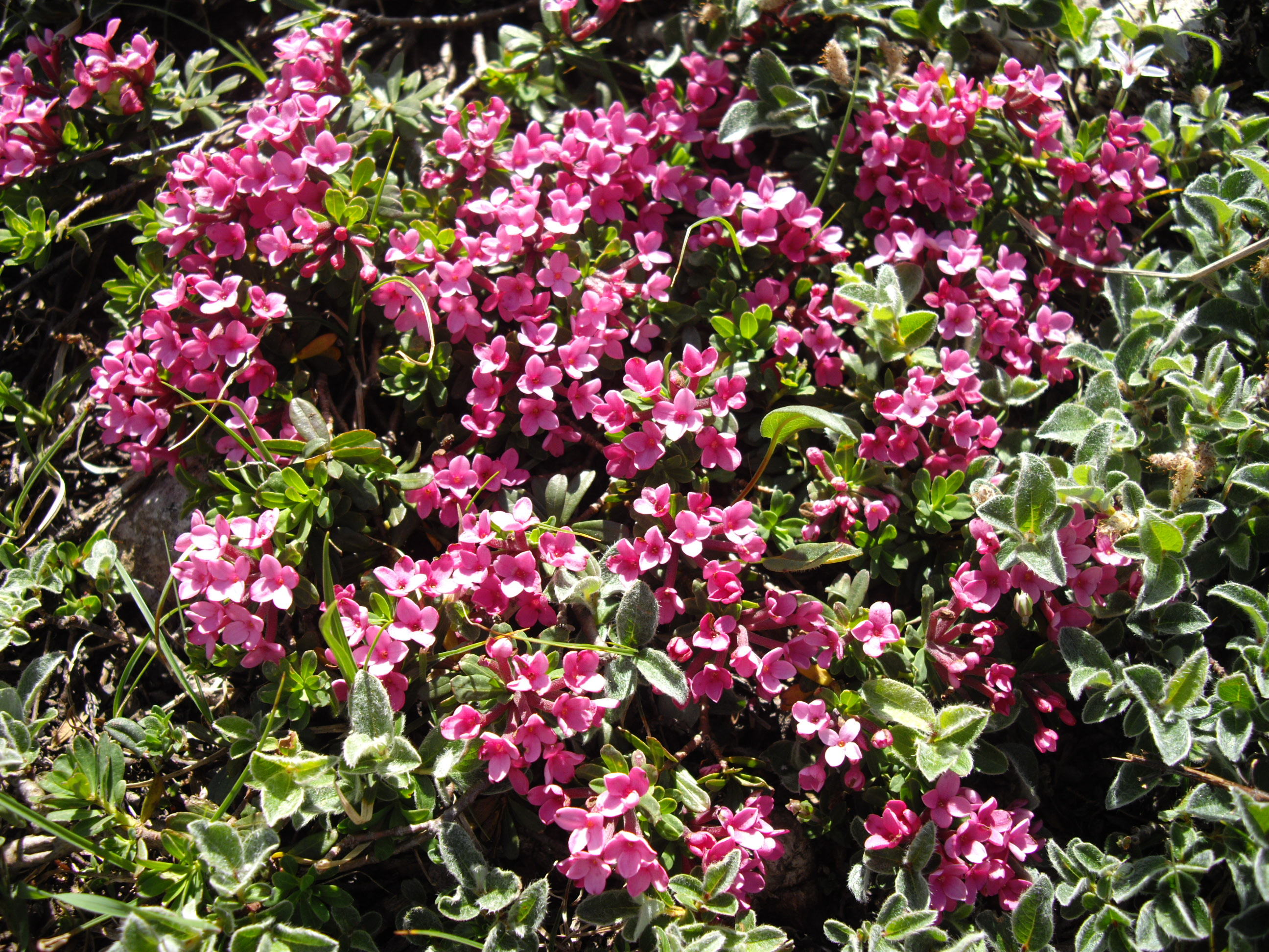 Daphne cneorum